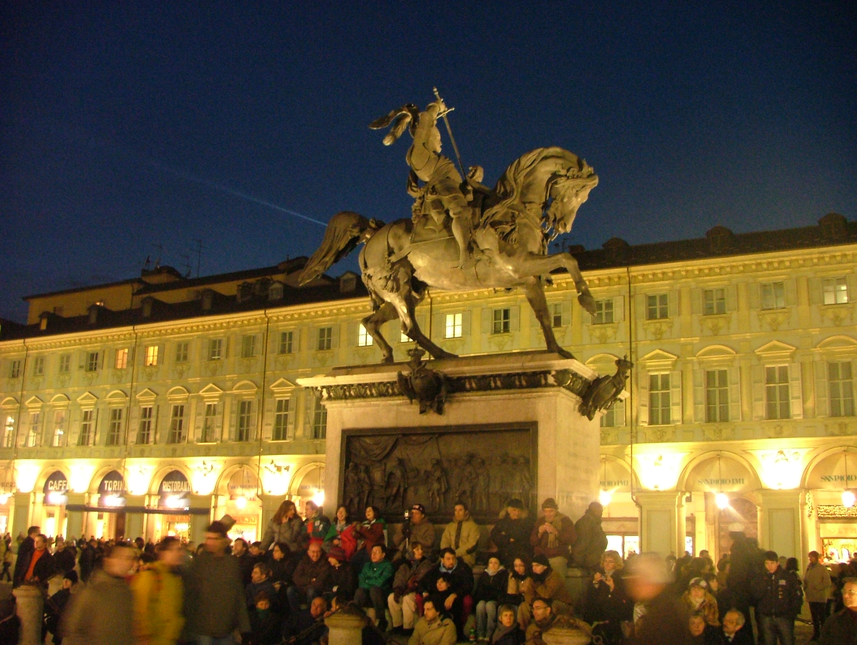 Torino Piazza San Carlo, monumento ad Emanuele Filberto di Savoia, detto il Caval 'd Brôns.